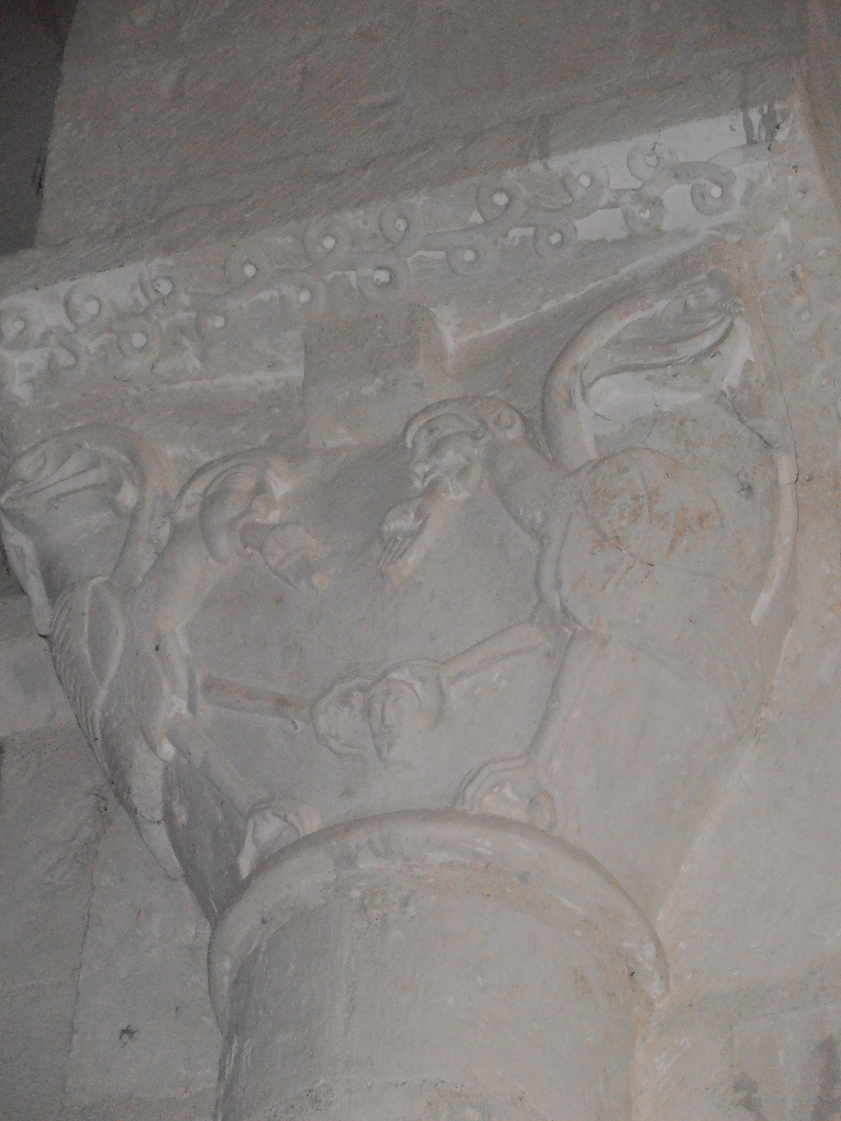 Chapiteau représentant des corps d'oiseaux à tête humaine à Laroche-Saint-Cydroine (Yonne) France